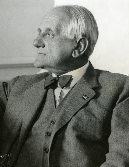 Kánya Kálmán portréja Az Est c. folyóiratban, 1930-as évek